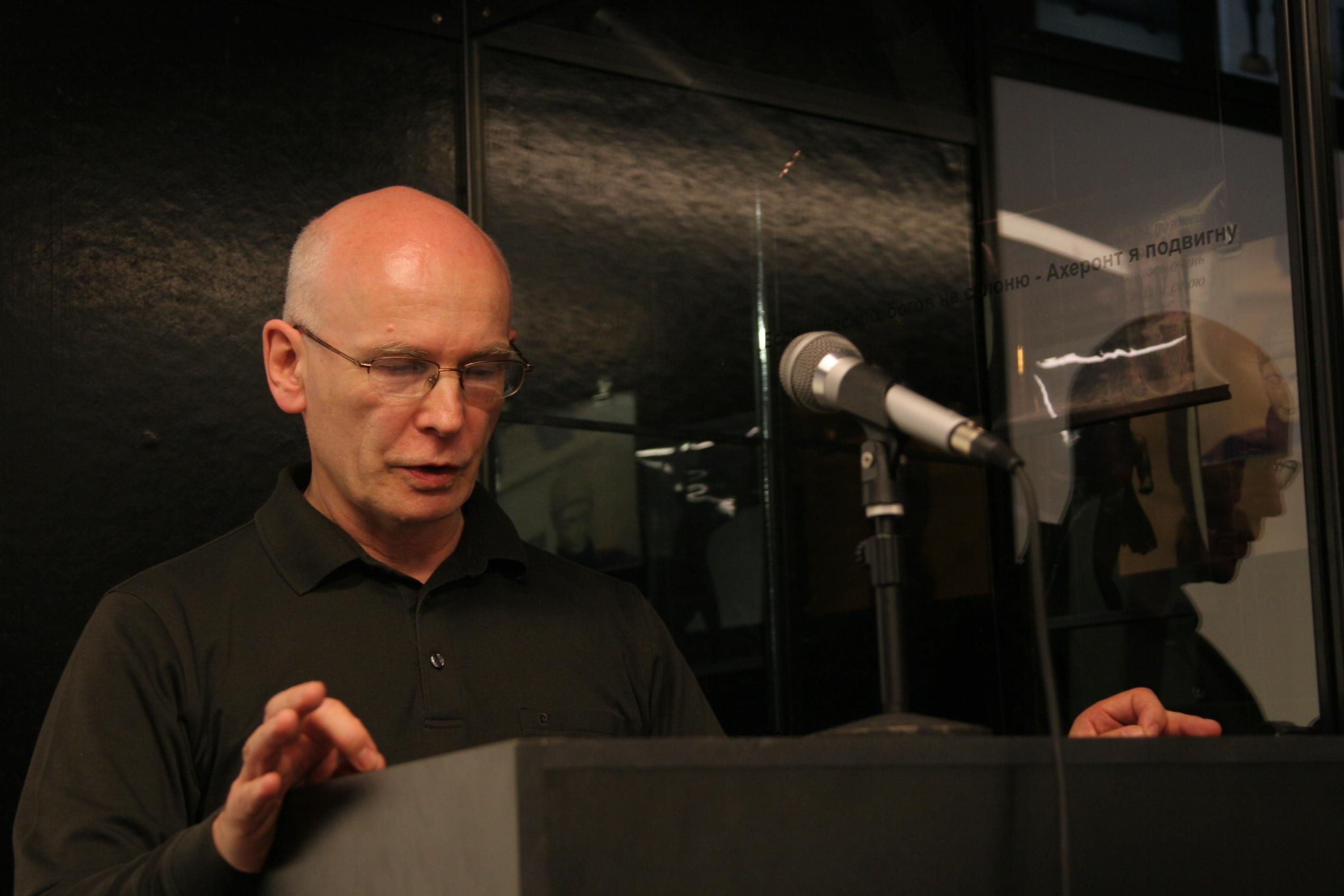 Младен Долар в Музее Сновидений Фрейда